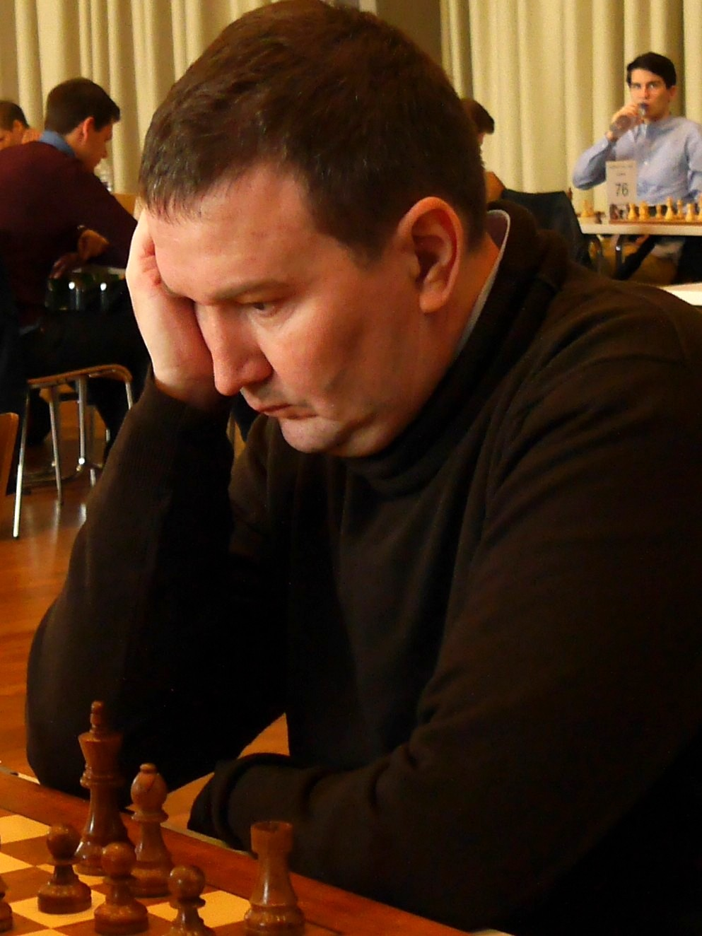 Sergey Volkov (Sergei Wiktorowitsch Wolkow), Grenke Chess Open 2017 in Karlsruhe.